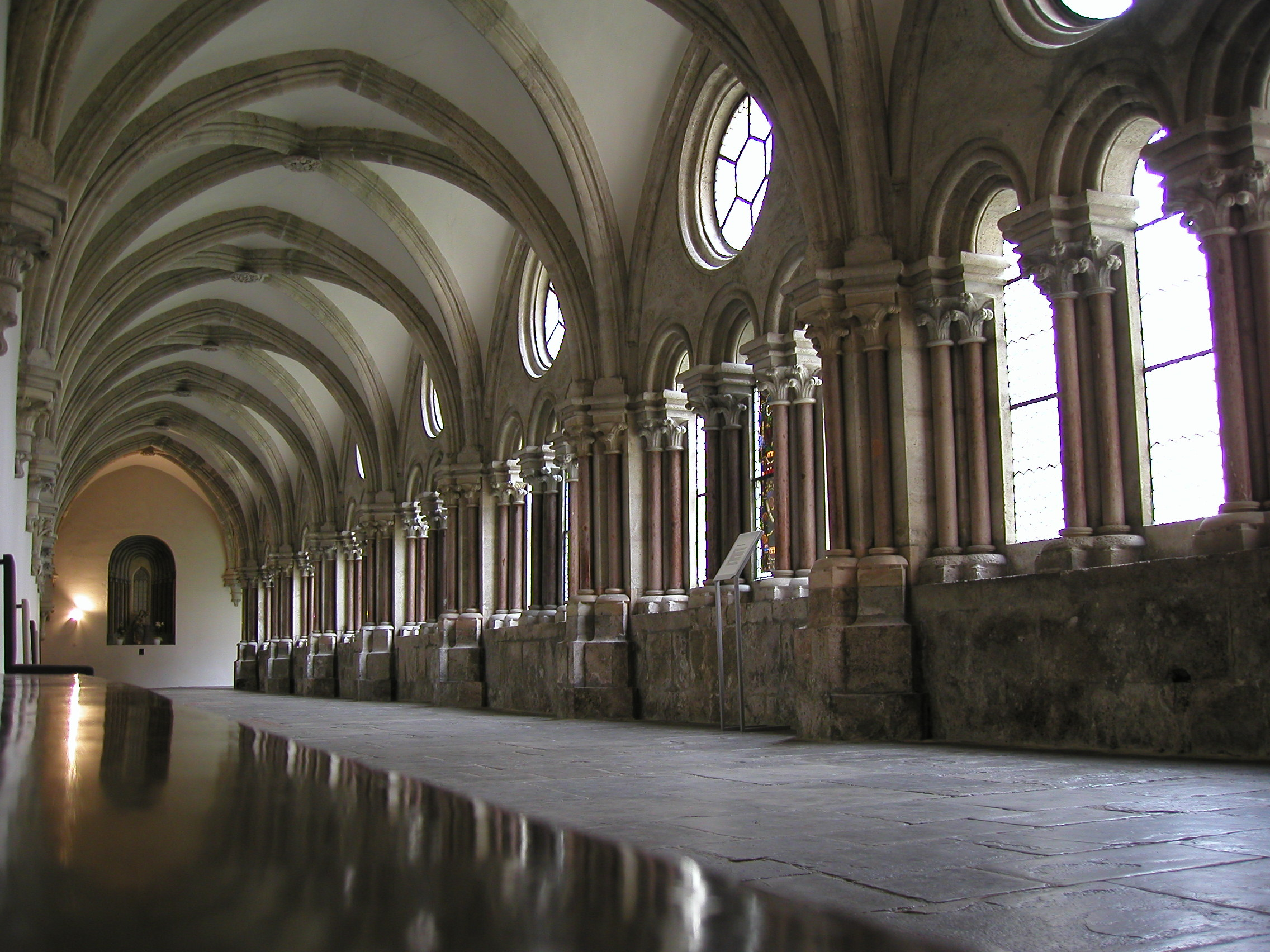 Stift Lilienfeld